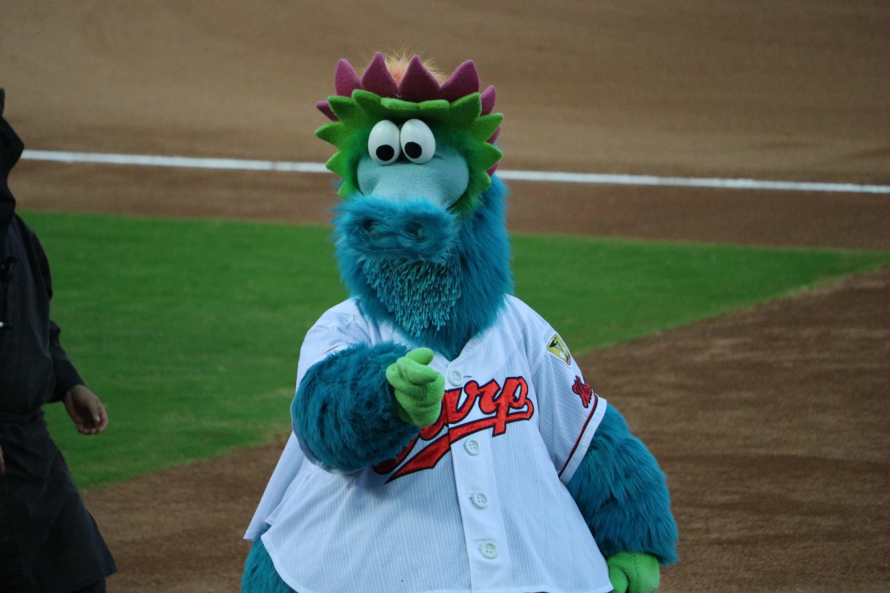 2017/9/28 マツダスタジアム